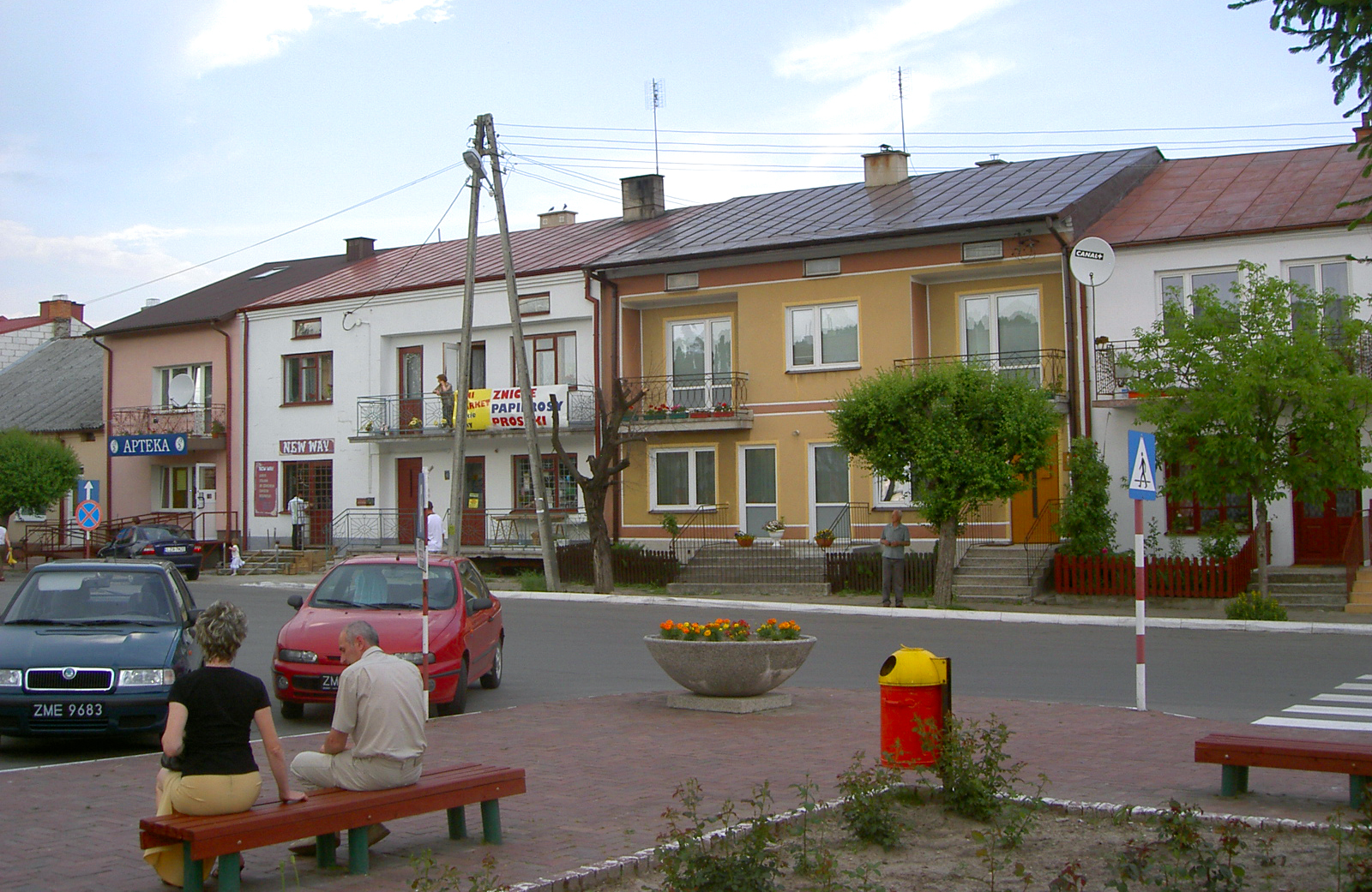 Goraj, Poland • Fragment Rynku / Town square